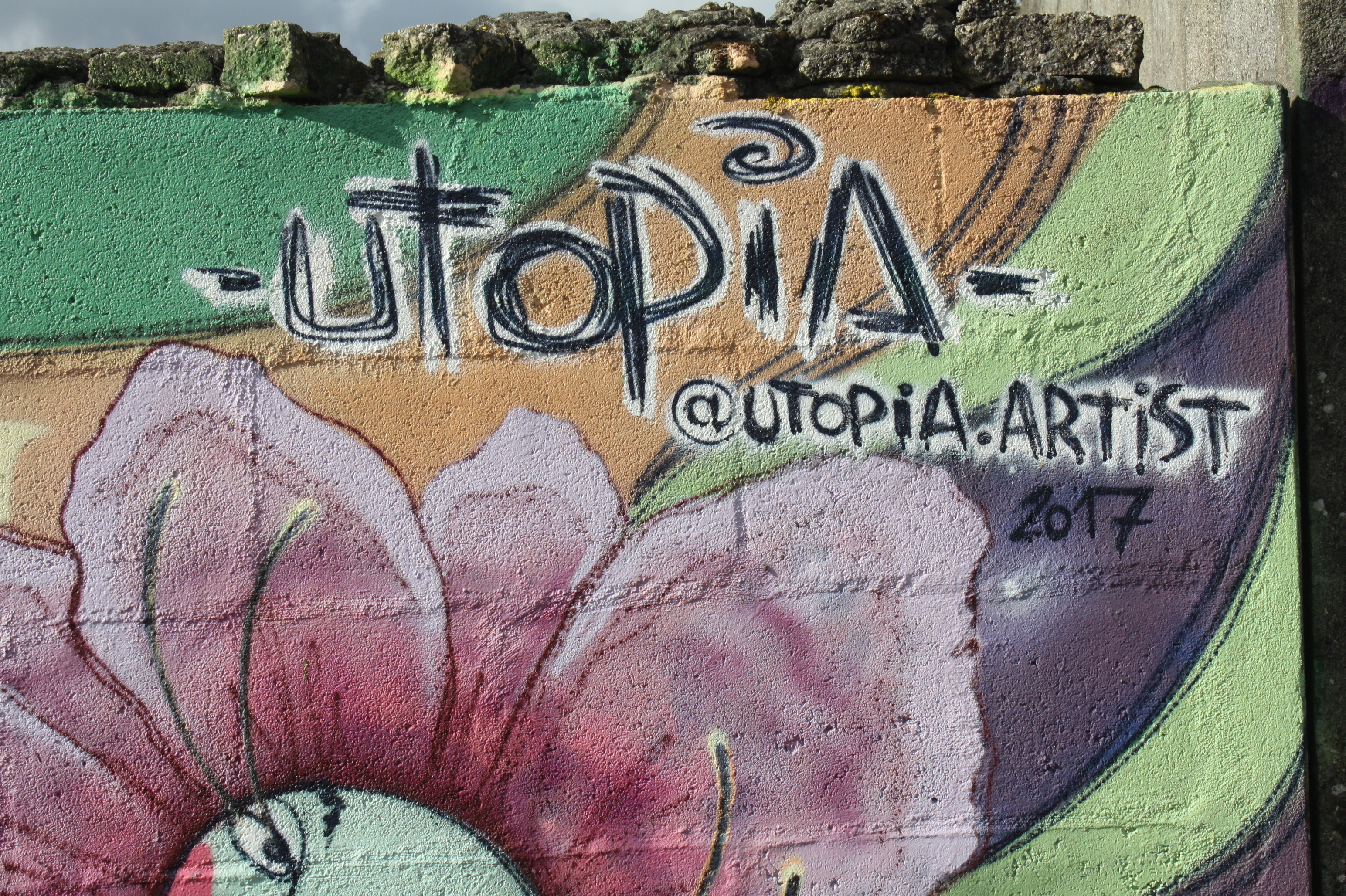 Graffiti na rúa Fernández Cochón, de Pontevedra, obra de Utopía Artist (2017)